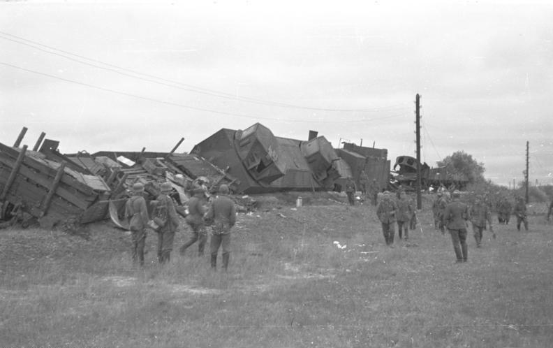 Vernichteter Panzerzug bei Potoki, 4.9.1941